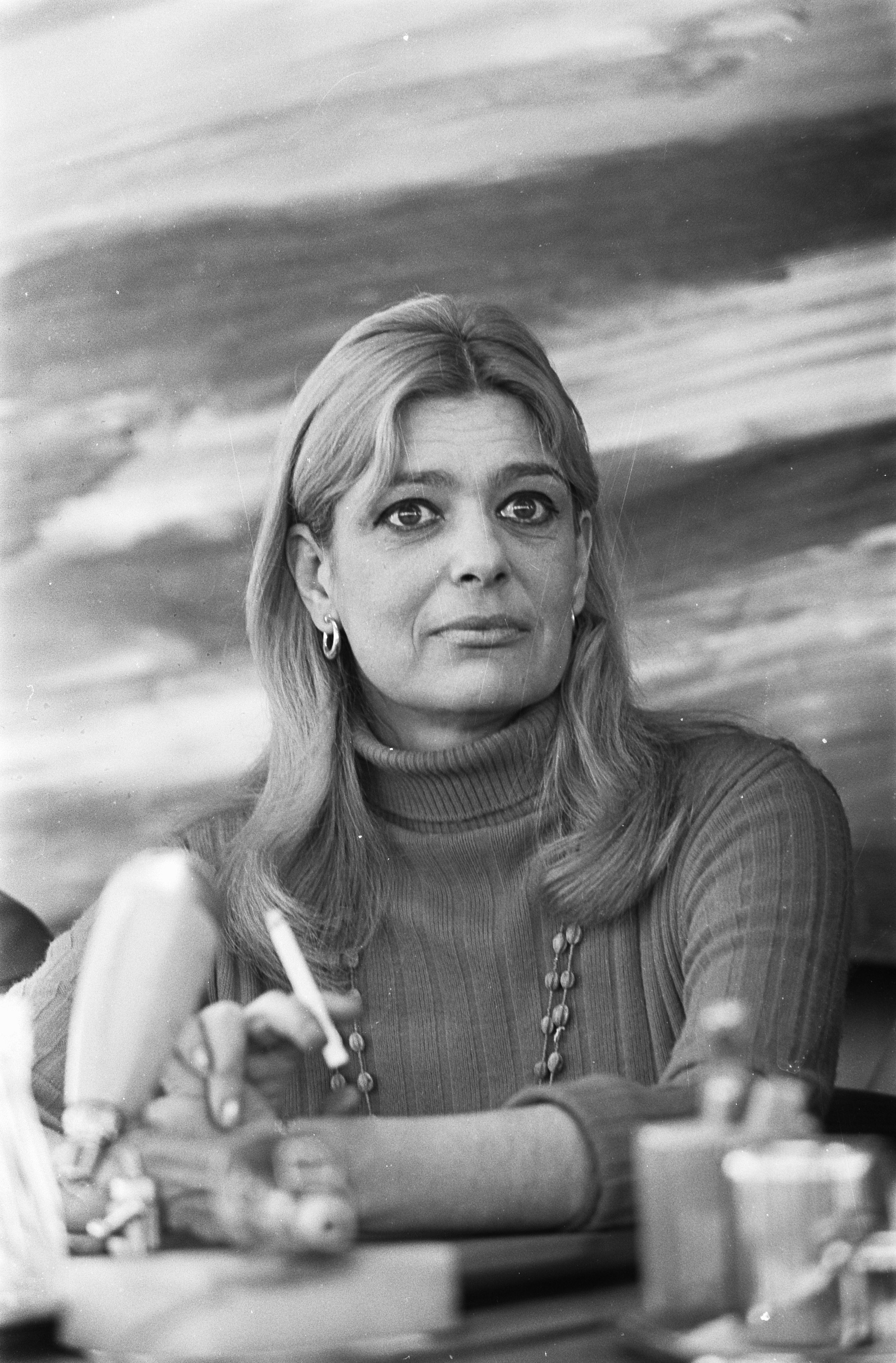 Collectie / Archief : Fotocollectie Anefo Reportage / Serie : [ onbekend ] Beschrijving : Aankomst Melina Mercouri . Melina Mercouri tijdens persconferentie in het NVV-gebouw te Amsterdam Datum : 14 mei 1968 Locatie : Amsterdam, Noord-Holland Trefwoorden : aankomsten, persconferenties Persoonsnaam : Mercouri, Melina Fotograaf : Nijs, Jac. de / Anefo Auteursrechthebbende : Nationaal Archief Materiaalsoort : Negatief (zwart/wit) Nummer archiefinventaris : bekijk toegang 2.24.01.05 Bestanddeelnummer : 921-3504